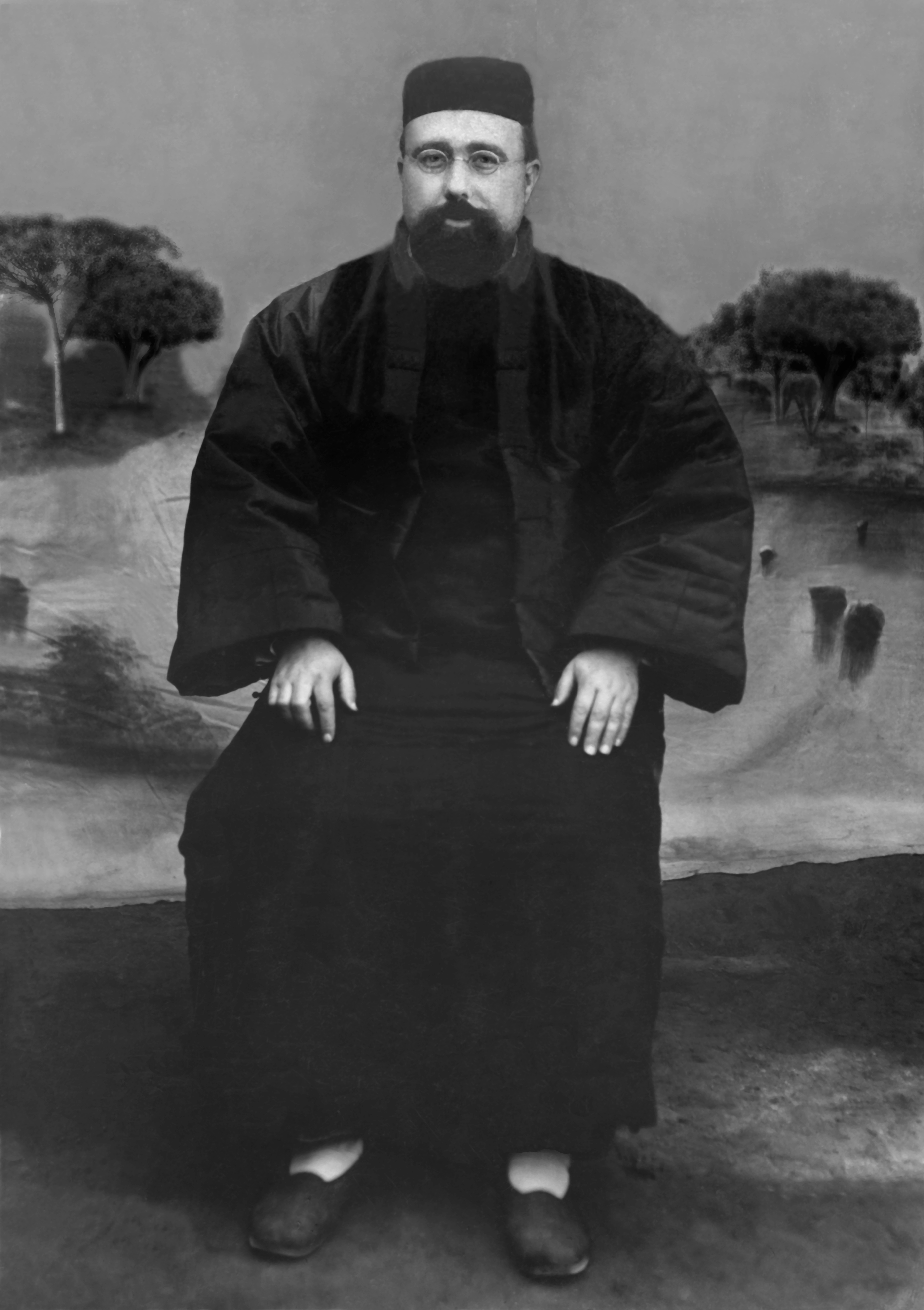 Padre Isidoro Saura Martínez, Religioso Franciscano Murciano.